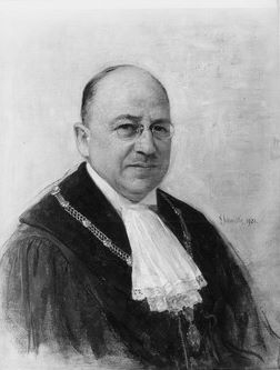 Bild in der Tübinger Professorengalerie